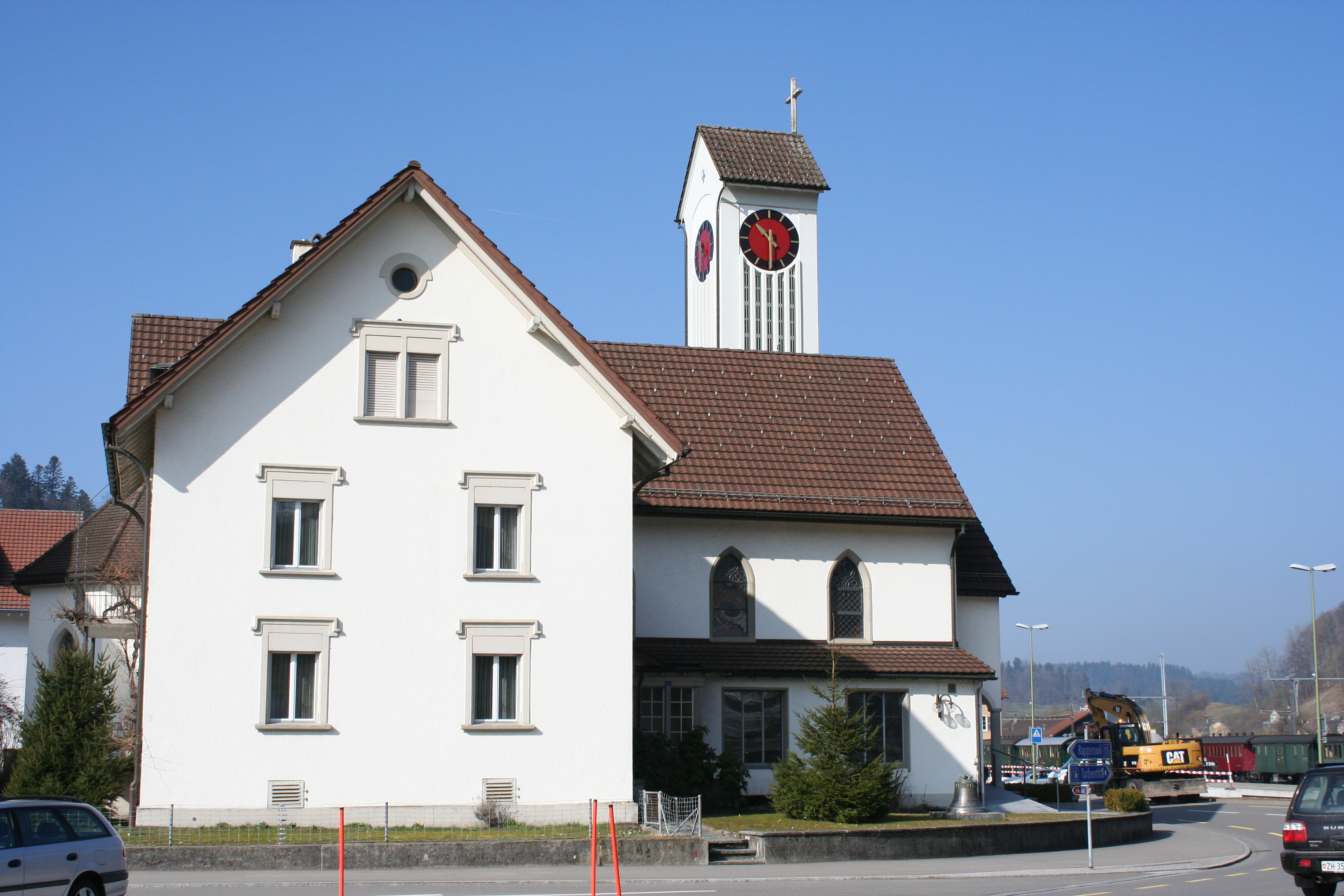 Römisch-katholische Kirche St. Anton Bauma, Ansicht von Osten